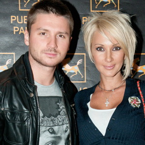 Сергей Лазарев и Лера Кудрявцева на вечеринке программы «Пусть говорят»